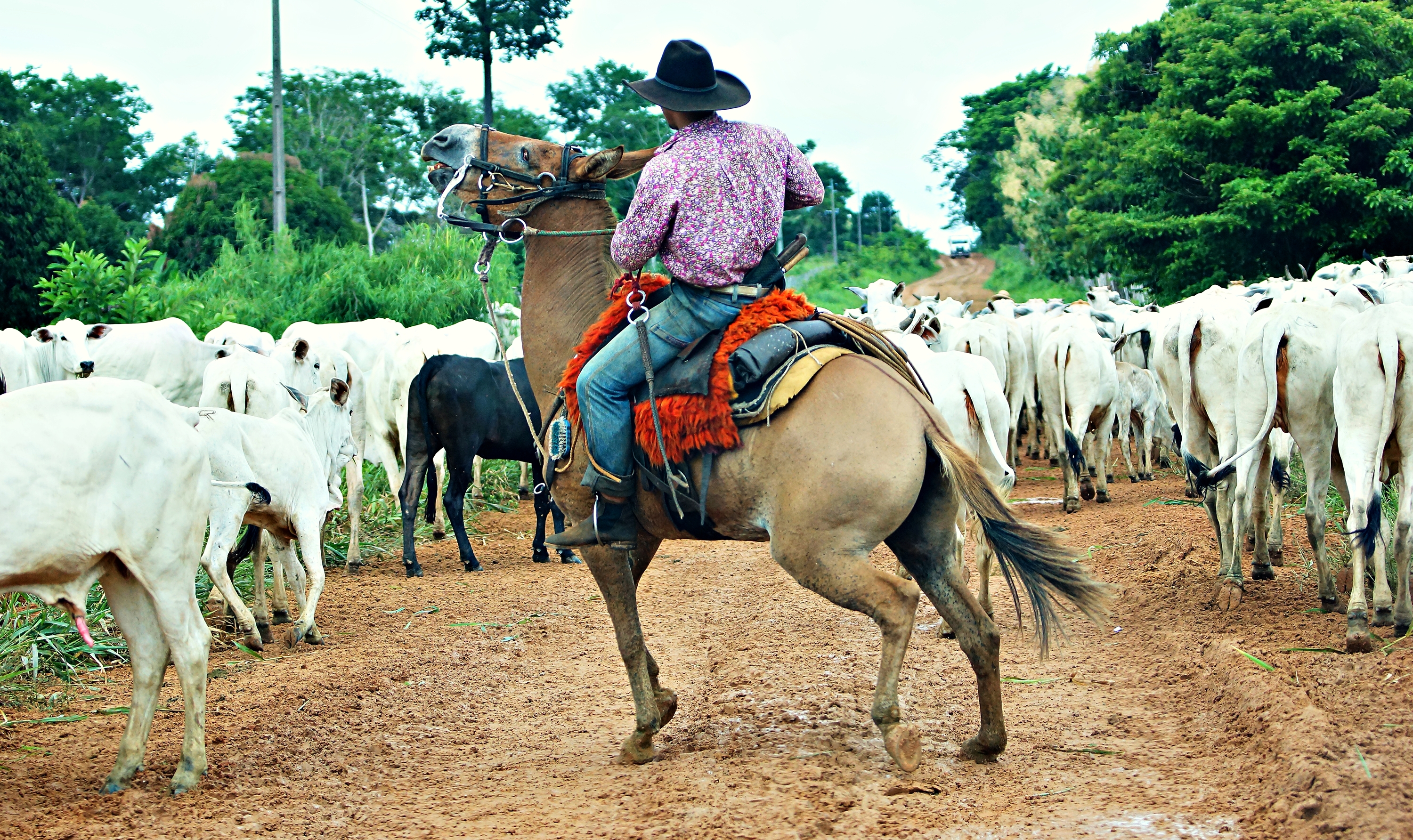 A atividade de condução de boiadas é comum na região do Mato Grosso